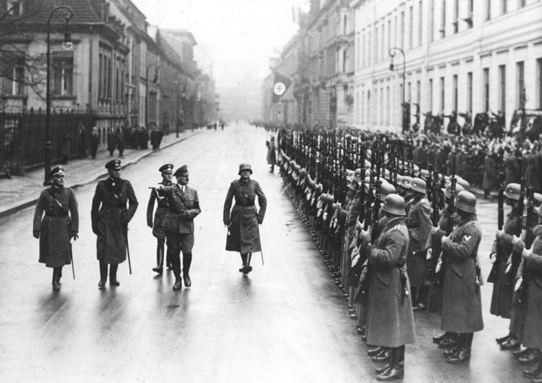 Der große Neujahrs-Empfang 1935 beim Führer Adolf Hitler in der Wilhelmstraße in Berlin! Der Führer Adolf Hitler schreitet mit hohen Generalen die Ehrenkompanie der Reichswehr am Neujahrstage vor seinem Palais in der Wilhelmstraße in Berlin ab.